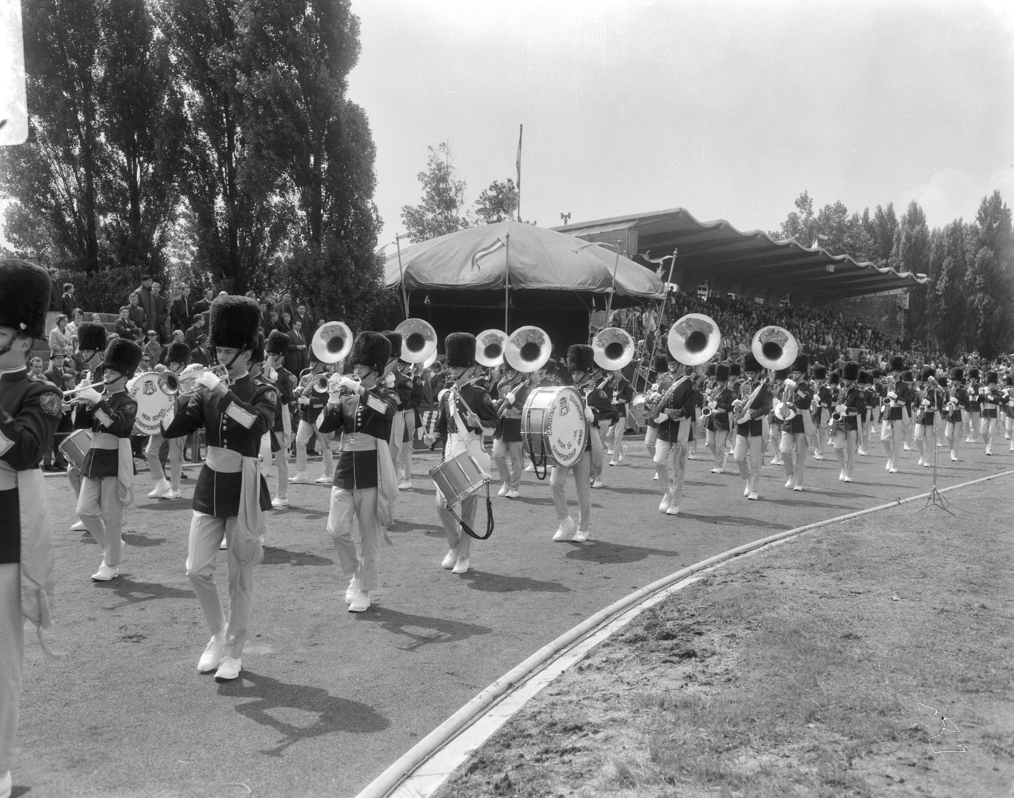 Collectie / Archief : Fotocollectie Anefo Reportage / Serie : [ onbekend ] Beschrijving : Muziekconcours te Kerkrade, tijdens de marswedstrijden - Cardinal Dougherty High School Marching Band Datum : 16 juli 1966 Locatie : Kerkrade Trefwoorden : muziekconcoursen Fotograaf : Bilsen, Joop van / Anefo Auteursrechthebbende : Nationaal Archief Materiaalsoort : Negatief (zwart/wit) Nummer archiefinventaris : bekijk toegang 2.24.01.04 Bestanddeelnummer : 919-3609